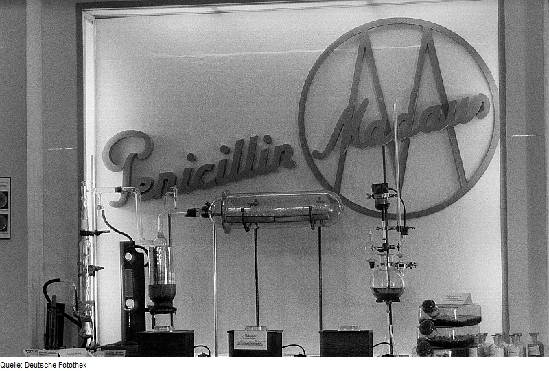 Original image description from the Deutsche FotothekStand der Arzneimittelfabrik Dr. Madaus & Co